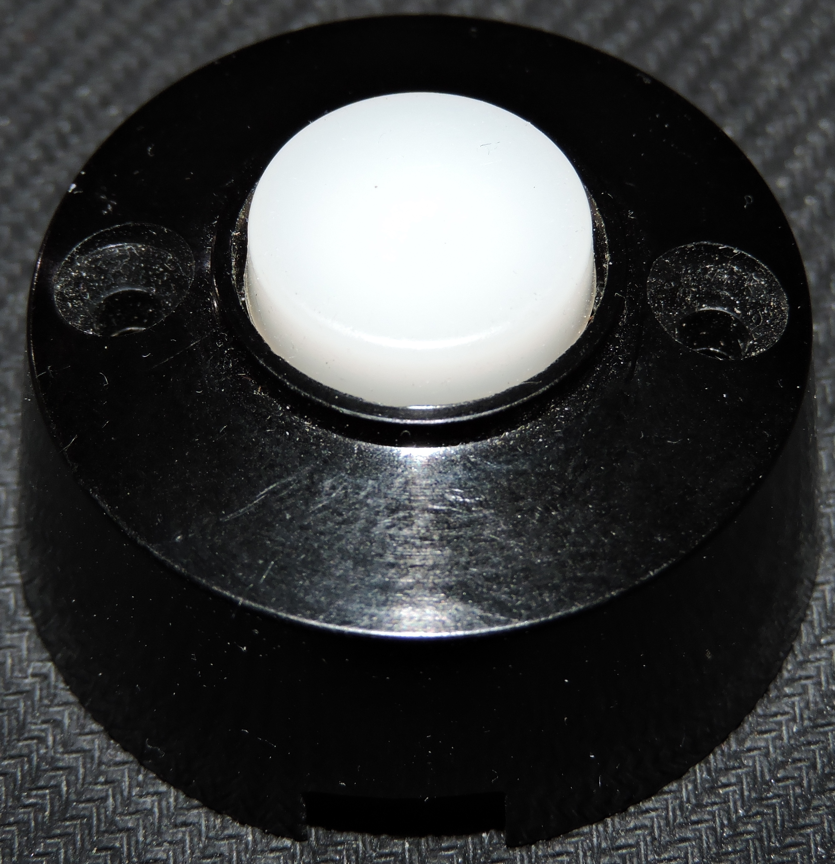 Типичная советская кнопка звонка. Кнопки такого вида обычно имели чёрный корпус, а вот клавиша была самых разных расцветок. Была рассчитана на стандартное напряжение 220 В при силе тока 0,3 А. Являлась наиболее распространённой в многоквартирных домах